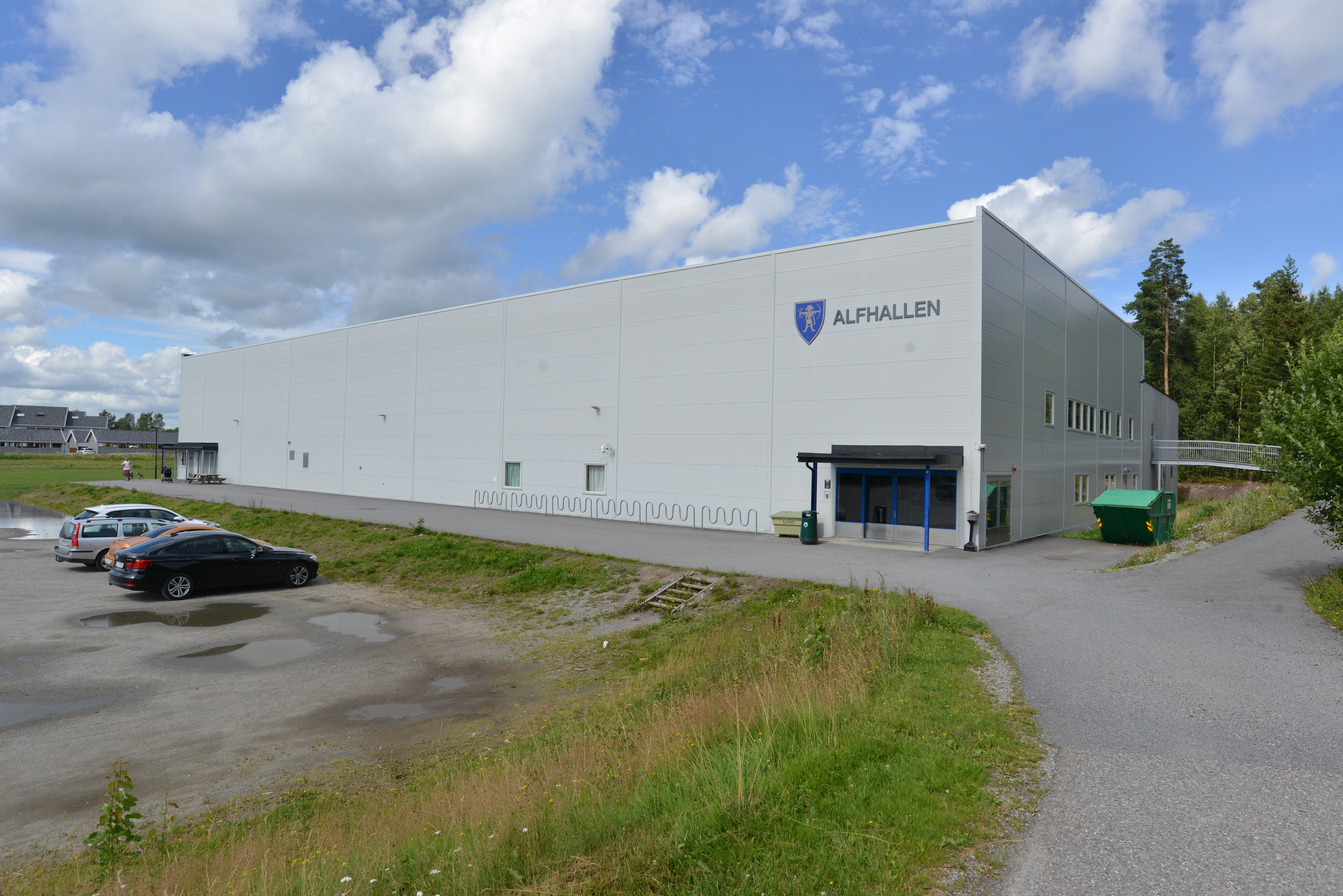 Alfhallen på Borgen